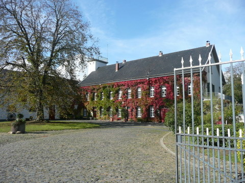 Ansicht von Gut Haanhof, Hauptgebäude